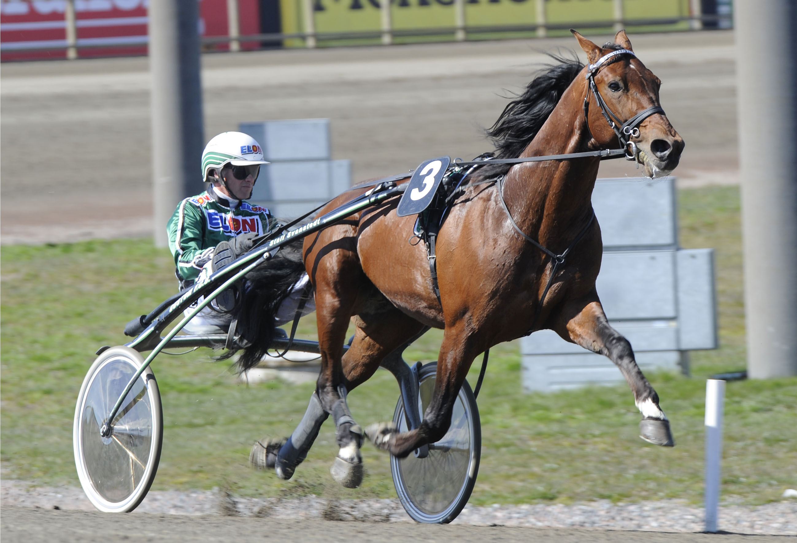 Kusken Åke Svanstedt och travaren Torvald Palema.